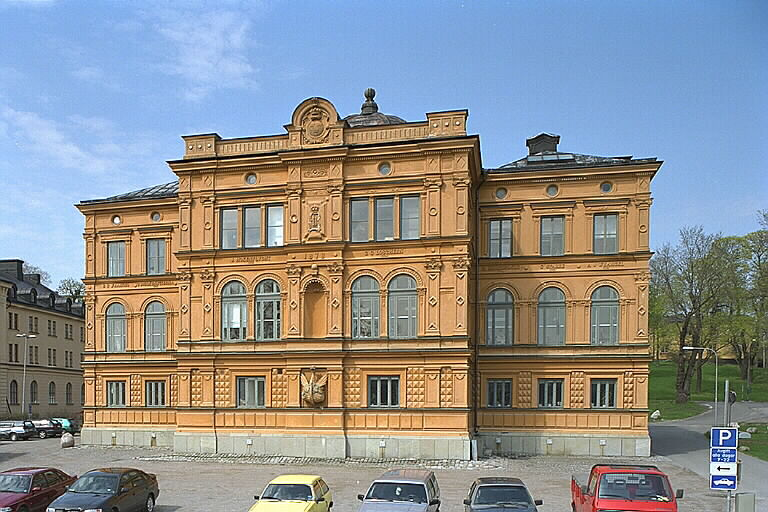 Gamla Sjökrigsskolan uppfördes 1876-79 efter ritningar av Axel Fredrik Nyström. 1943 flyttade Sjökrigsskolan till Näsby slott i Täby. Denna byggnad blev då kansli för örlogsstationen. Motiv: Gamla sjökrigsskolan Nyckelord: Byggnadsminnen:Statl, Riksintressen Kategori: SkolaGamla Sjökrigsskolan uppfördes 1876-79 efter ritningar av Axel Fredrik Nyström. 1943 flyttade Sjökrigsskolan till Näsby slott i Täby. Denna byggnad blev då kansli för örlogsstationen.